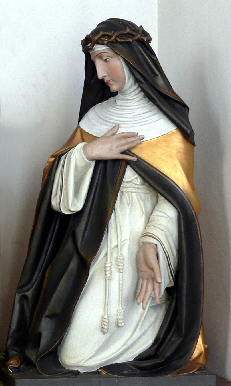 Ittendorf (Ortsteil von Markdorf), Bodenseekreis, Baden-Württemberg Pfarrkirche St. Martin, erbaut um 1660–1680 Rosenkranzgruppe (die Muttergottes übergibt dem Hl. Dominikus und der Hl. Katharina von Siena den Rosenkranz); 1907 (ursprünglich für den Hochaltar geschaffen; dort seit 1978 wieder die Madonna von Schenk)